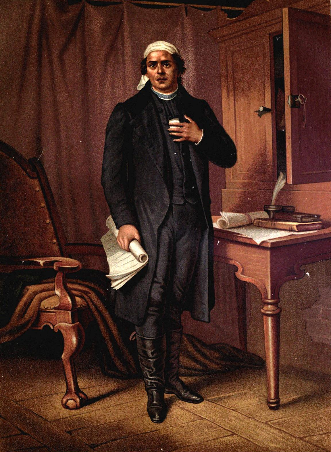 Imagen extraida del libro de Vicente Riva Palacio, Julio Zárate (1880) "México a través de los siglos" Tomo III: "La guerra de independencia" (1808 - 1821)